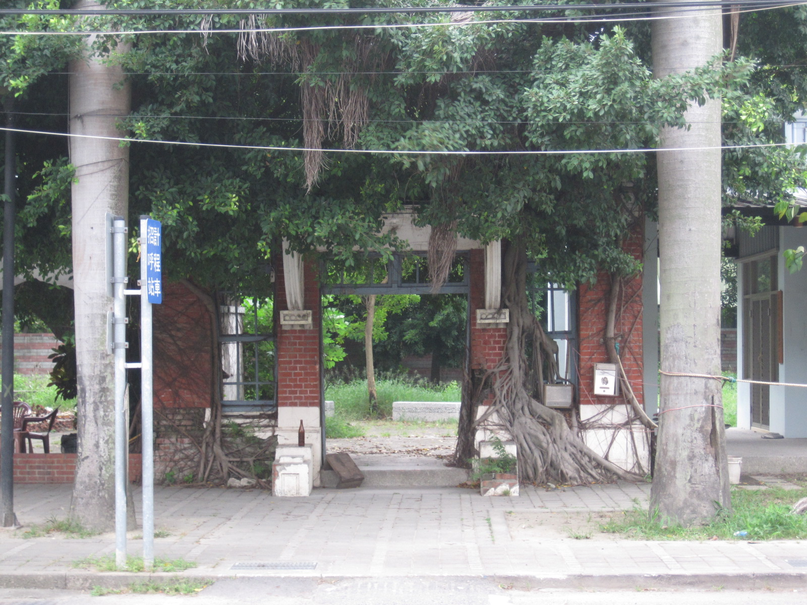 位在臺灣臺南市仁德區保安車站前方的舊警察廳舍磚造玄關，曾作為文賢派出所。